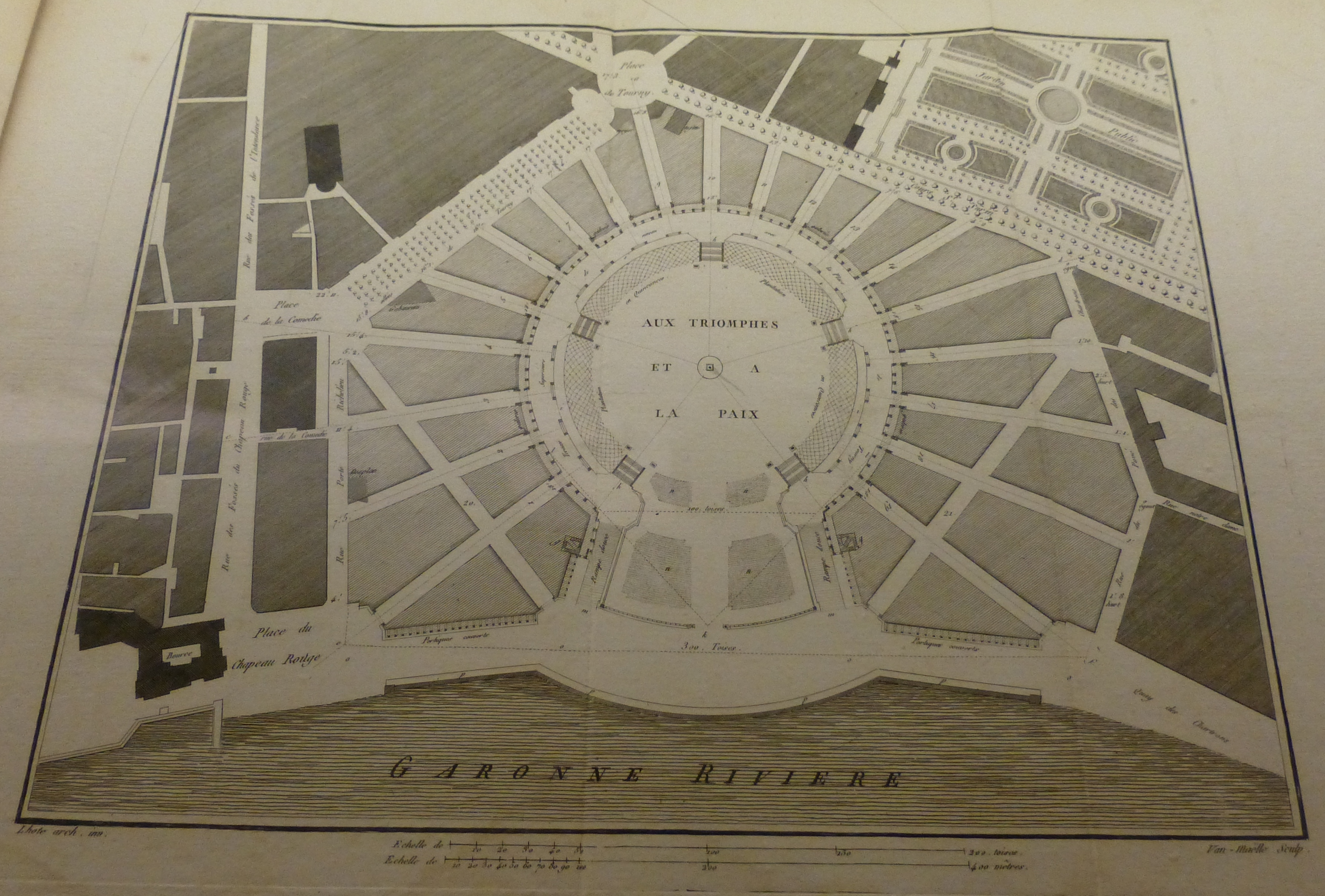 Bordeaux, Archives départementales de la Gironde, exposition Variations ː projet d'aménagement de la future place des Quinconces sur le site du Château Trompette, 1801.